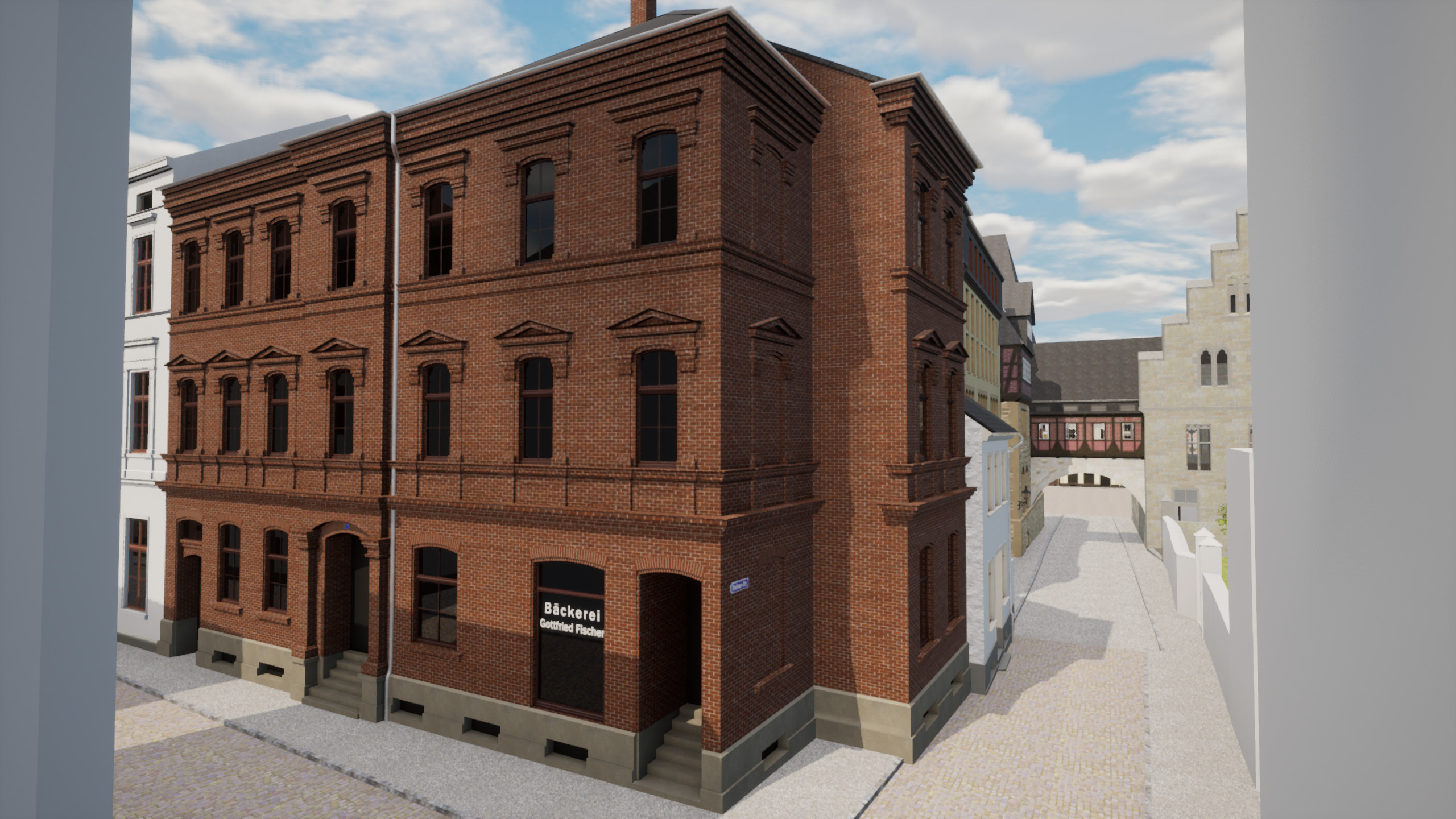 Rekonstruktion der Straßenkreuzung von Balken- und Brauhausstraße für das Jahr 1909. Blick nach Norden die Balkenstraße entlang in Richtung des alten Rathauses. Das Backsteingebäude ist die Bäckerei Fischer Brauhausstraße 7-9, heute bekannt als Fischer am Rathaus. Heute ist der nördlichste Teil der Balkenstraße überbaut, an seiner Stelle befindet sich der Eingang zum Hansa-Carré.